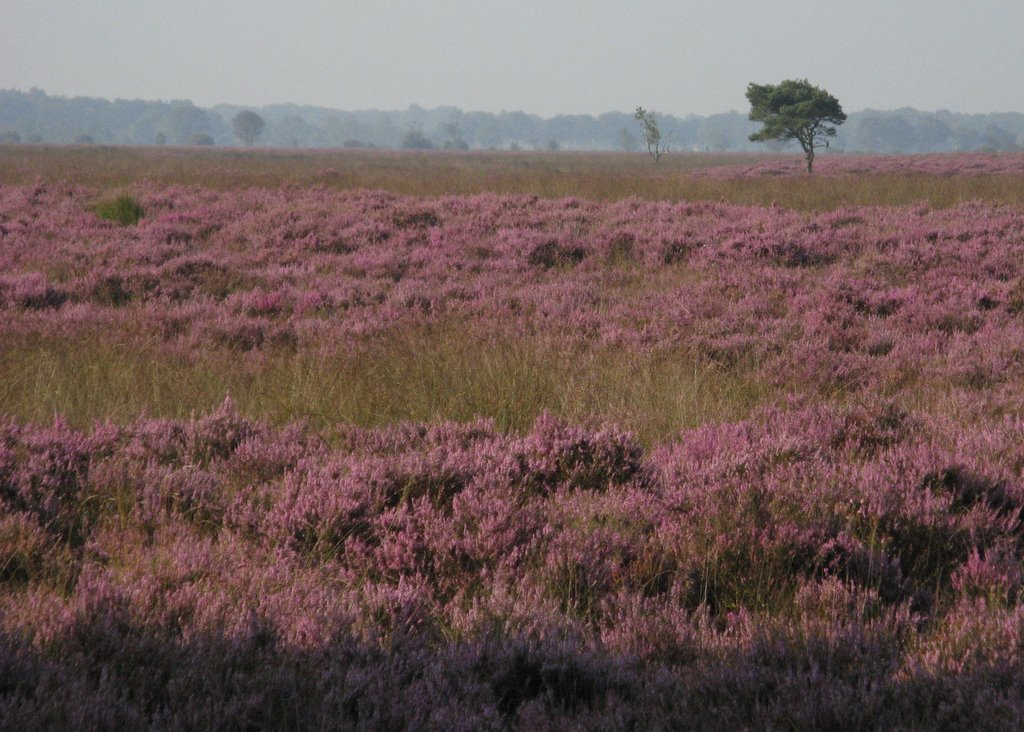 Heide op het Dwingelderveld